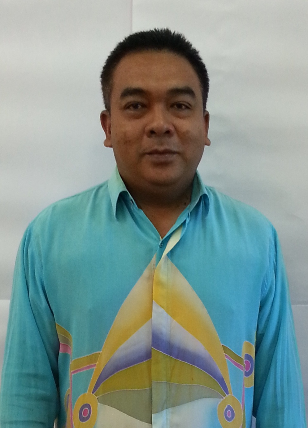 En. Khairuzzaman Bin Abdul Aziz